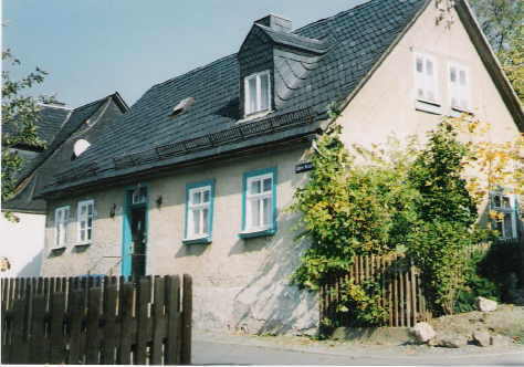 Wohnhaus